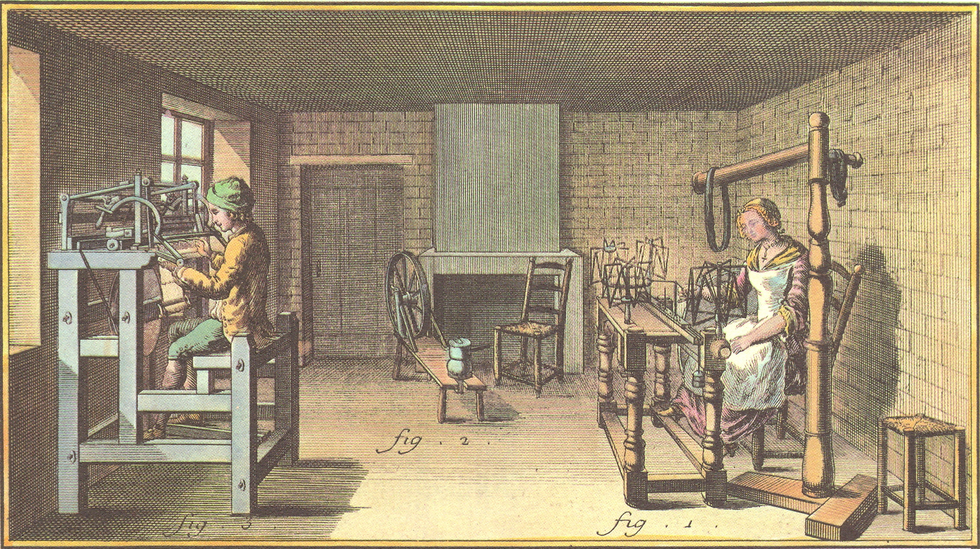 Kötőműhely ábrázolása a Diderot-féle Francia Enciklopédiában (1763)